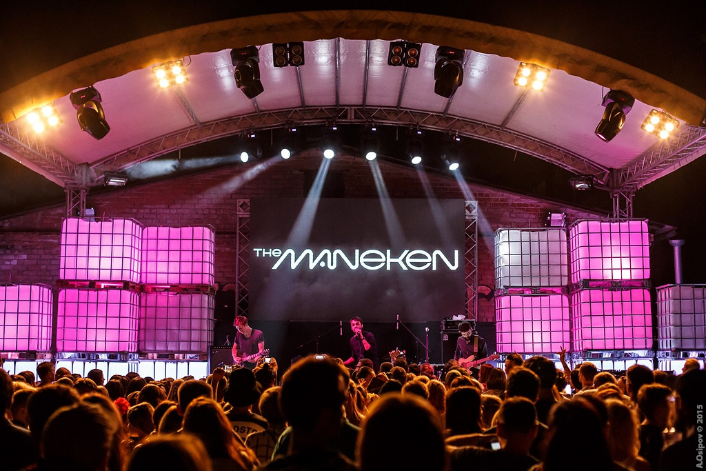 The Maneken @ "Белые ночи", Арт-завод "Платформа"